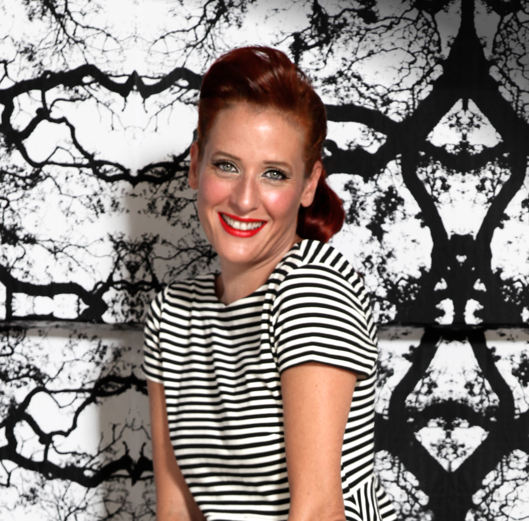 Aitziber Alonso ilustratzailea